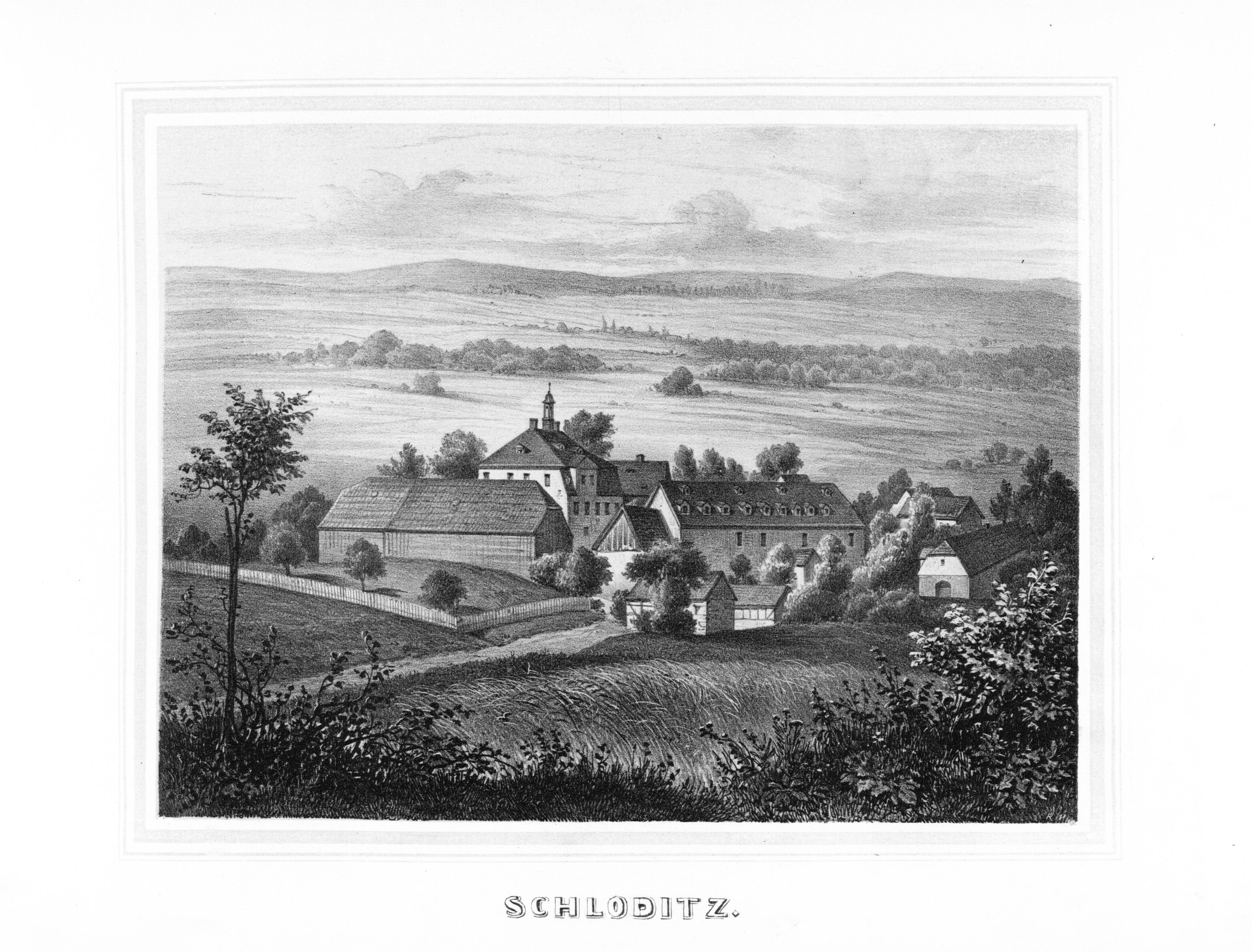 Schloditz aus: Album der Rittergüter und Schlösser im Königreiche Sachsen Voigtländischer Kreis Section: V